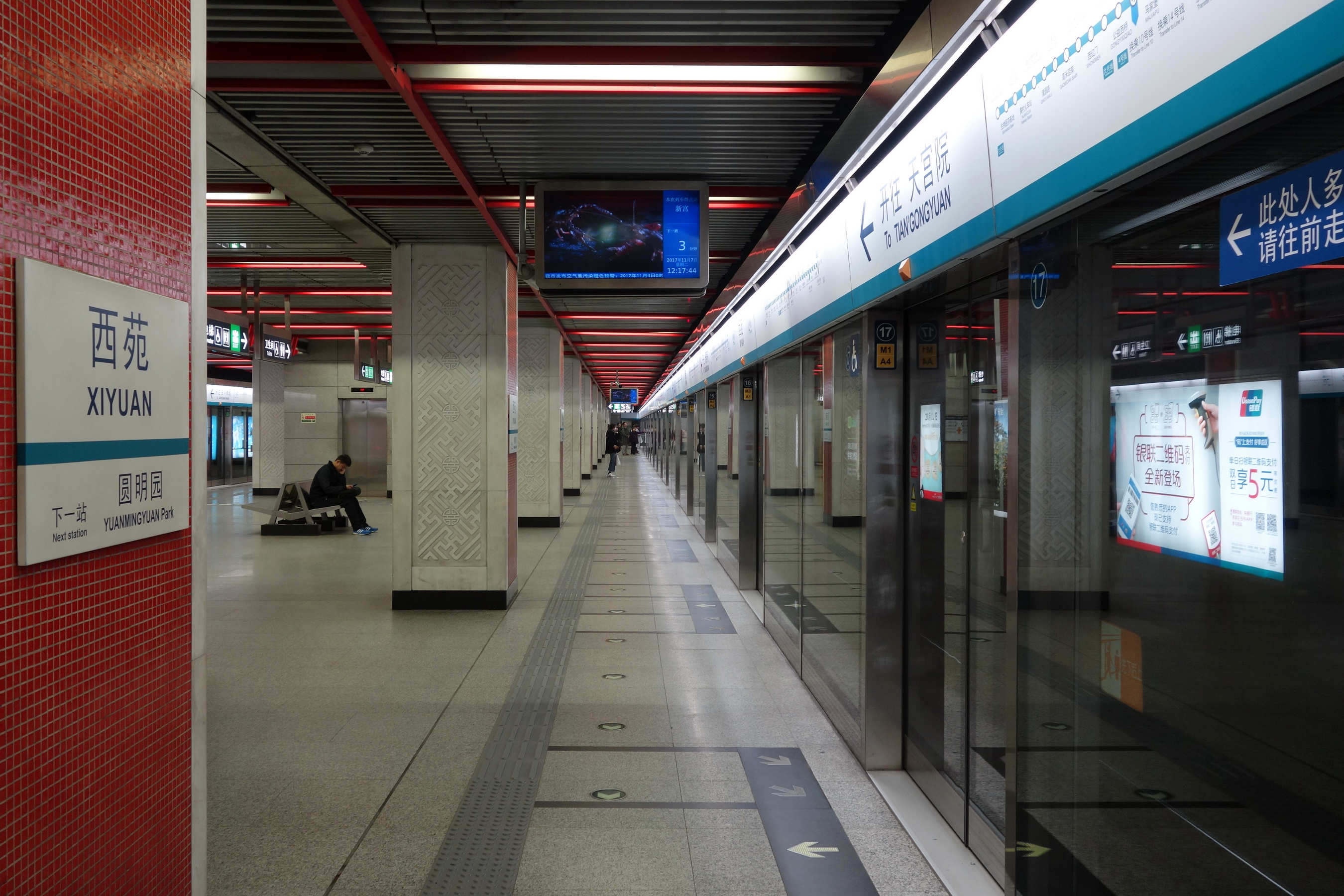 北京地铁4号线西苑站站台